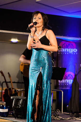 Anne Tanskanen Tangomarkkinat 2012 semifinaalikarsinnoissa 17.6.2012